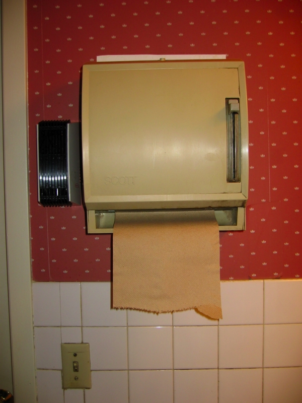 beige spring load paper towel dispenser